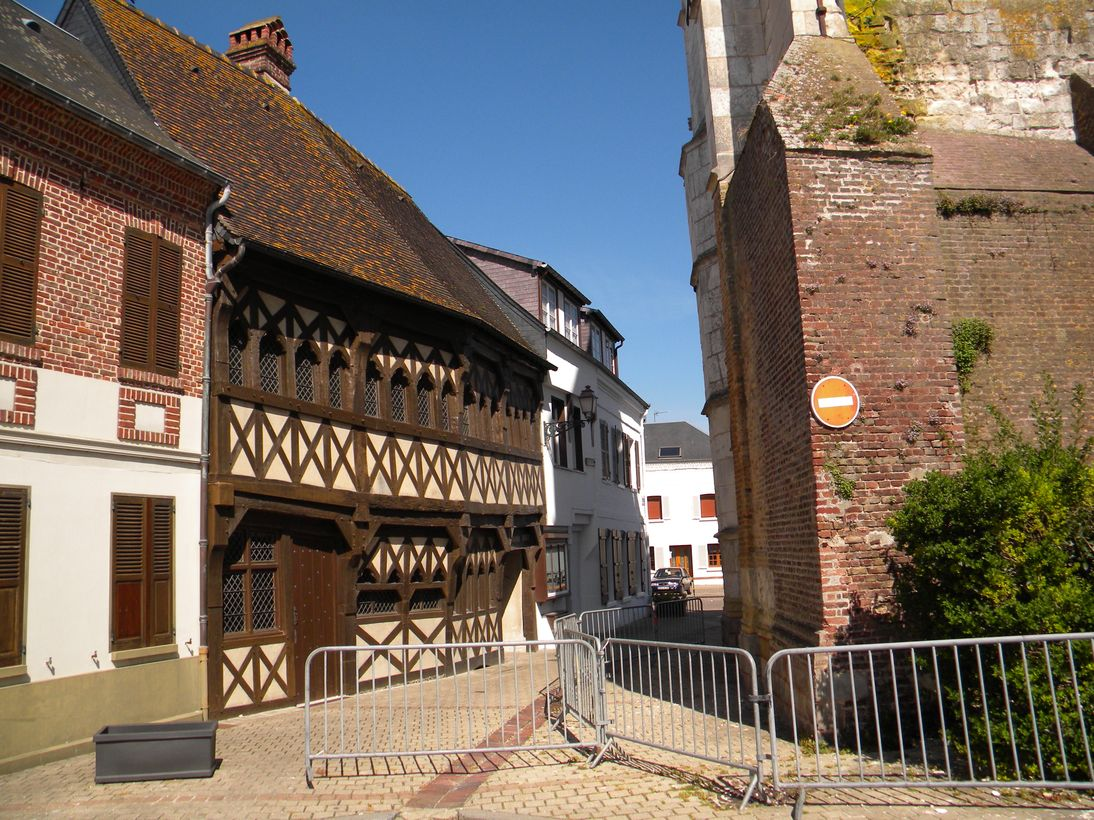 Vieille maison à Rue dans la Somme en France